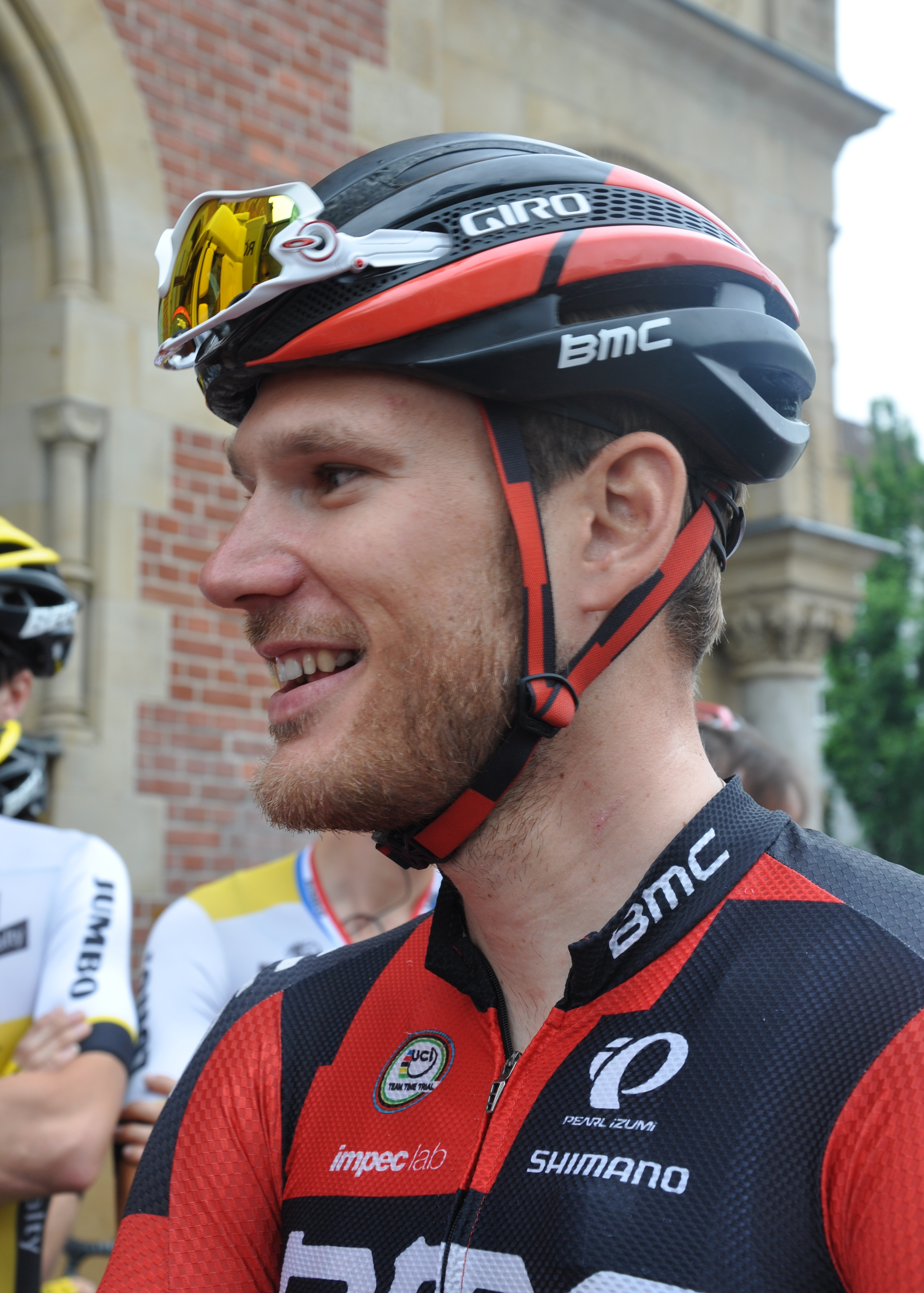 Jempy Drucker, luxemburgischer Radsportler